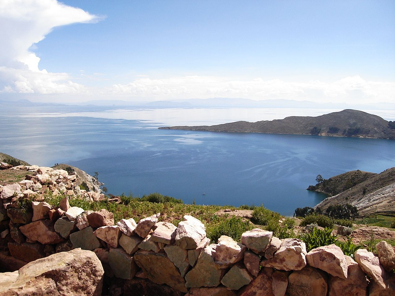 Foto tirada por mim, na Isla del Sol.